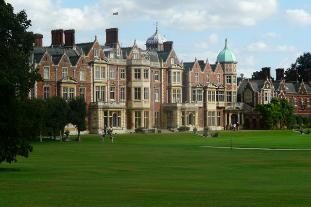 Sandringham